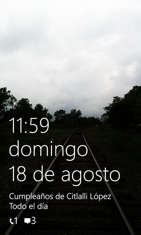 Simulación de la pantalla de bloqueo de Windows Phone 7.